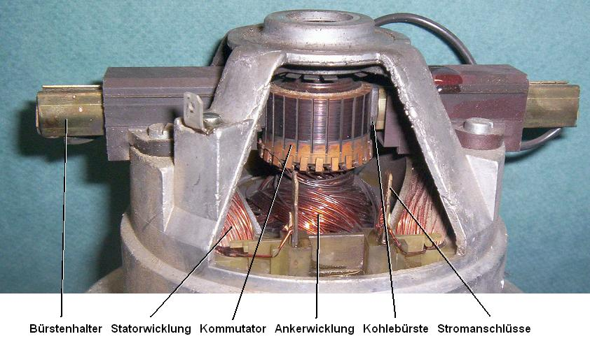 Reihenschlussmotor (Universalmotor) einer Staubsauger-Radialturbine.